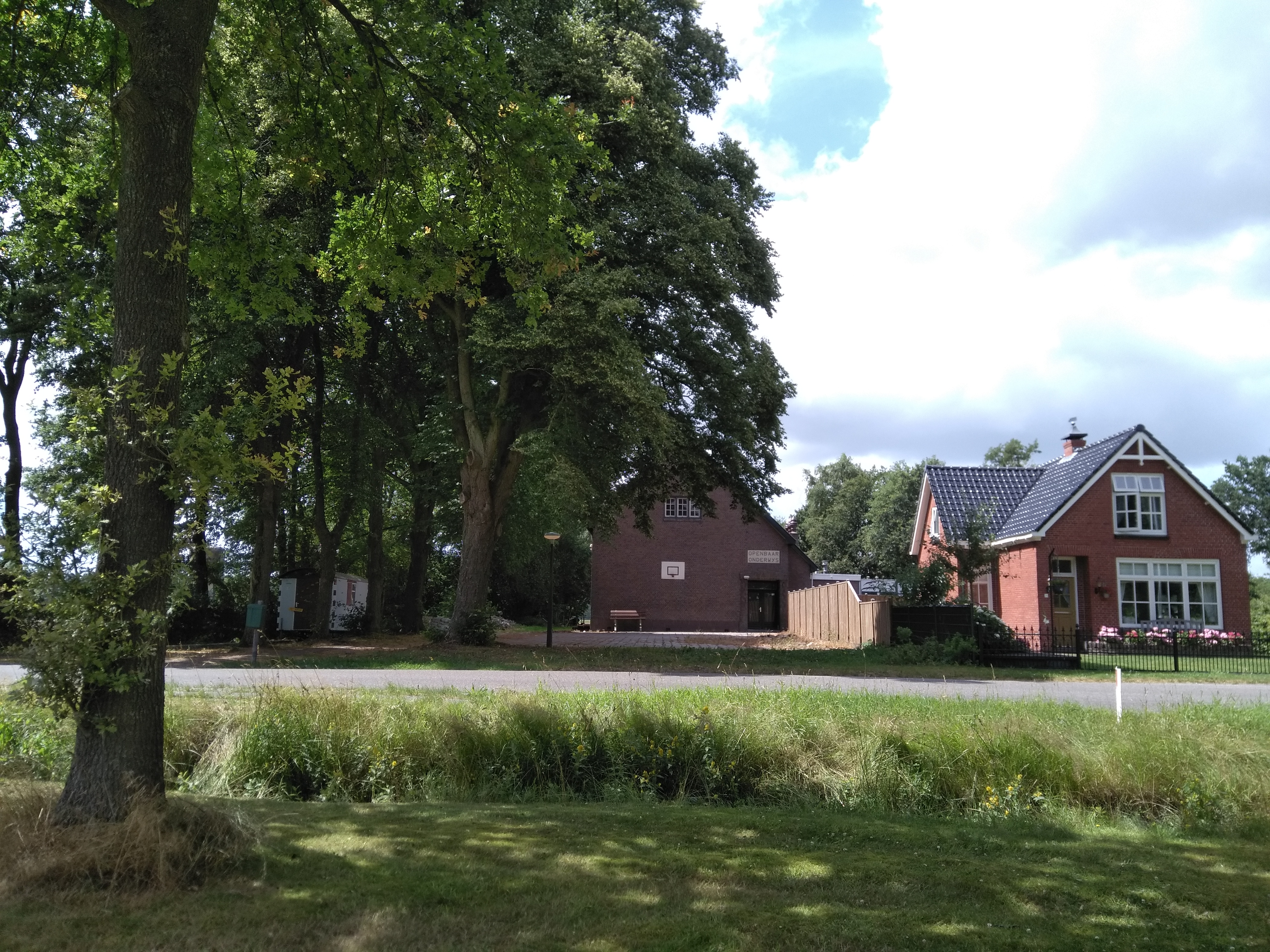 Voormalige openbare basisschool in Siegerswoude, gemeente Opsterland, Friesland.